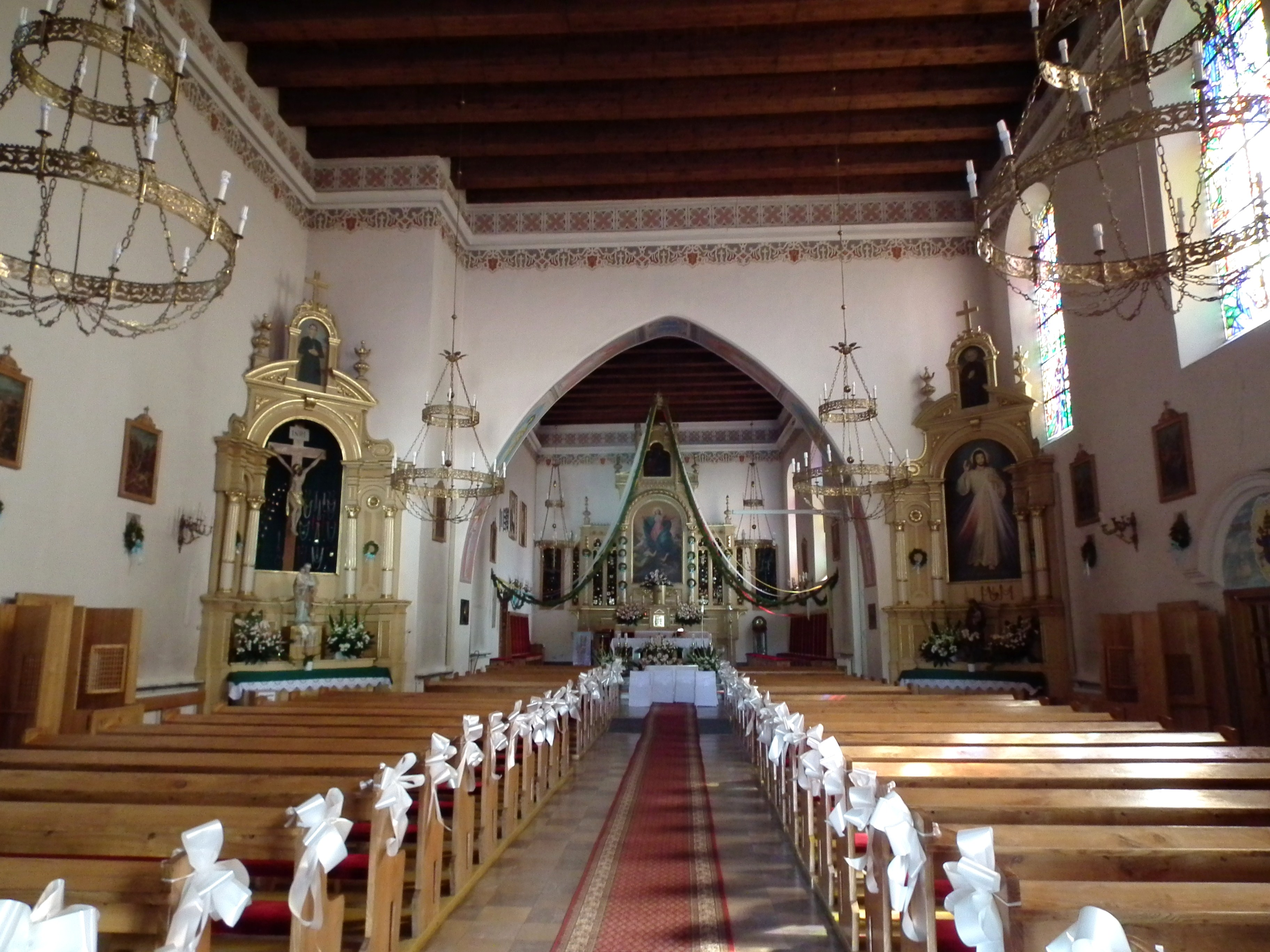 Kościół Benedyktynów w Sierpcu.